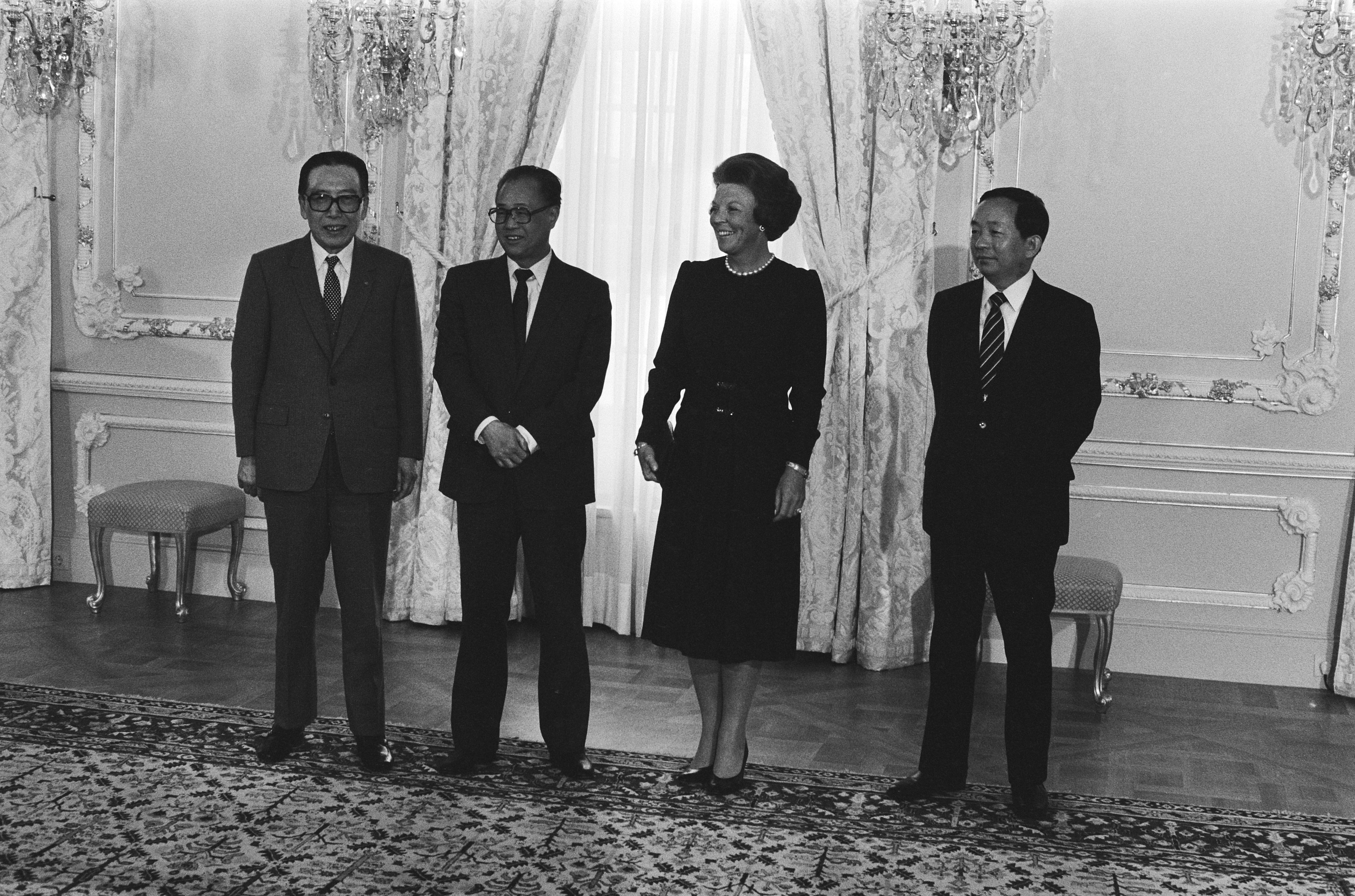 Collectie / Archief : Fotocollectie Anefo Reportage / Serie : Bezoek Chinese premier Zhao Ziyang Beschrijving : De Chinese premier Zhao Ziyang (tweede van links) wordt door koningin Beatrix ontvangen op Paleis Noordeinde Datum : 17 juni 1985 Locatie : Den Haag, Zuid-Holland Trefwoorden : Ontvangsten, bezoeken, koninginnen, premiers Persoonsnaam : Beatrix, koningin, Ziyang, Zhao Instellingsnaam : Paleis Noordeinde Fotograaf : Bogaerts, Rob / Anefo Auteursrechthebbende : Nationaal Archief Materiaalsoort : Negatief (zwart/wit) Nummer archiefinventaris : bekijk toegang 2.24.01.05 Bestanddeelnummer : 933-3559